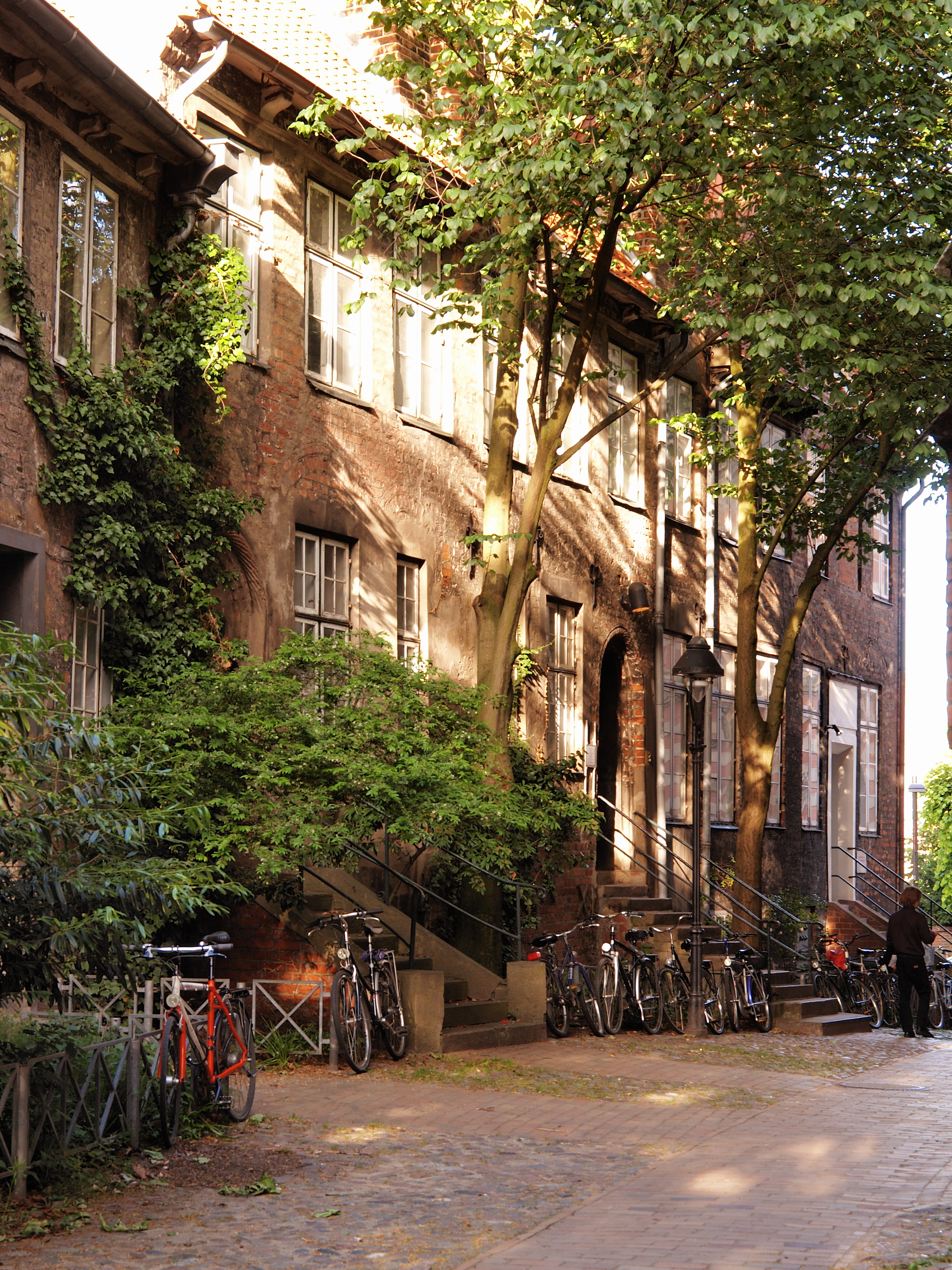 Die Pastorenhäuser am Jakobikirchhof in Lübeck, Südseite